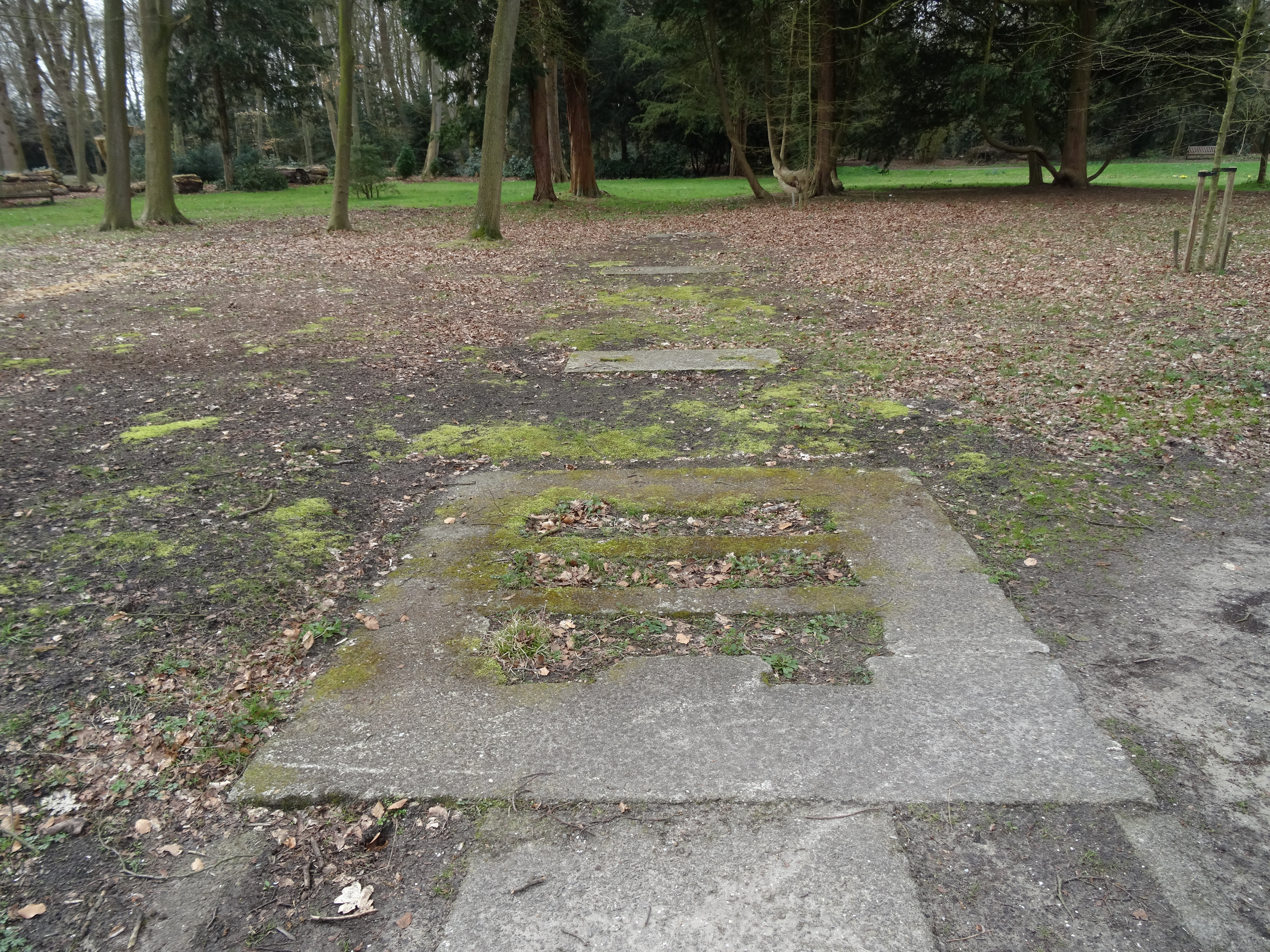 Park bij Huis te Warmond: de resten van een V1 lanceerbaan, die aan het eind van de Tweede Wereldoorlog werd gebouwd, maar nooit is gebruikt.